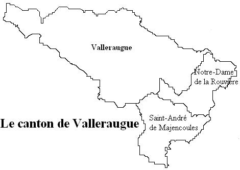 Le canton de Valleraugue Image personnelle